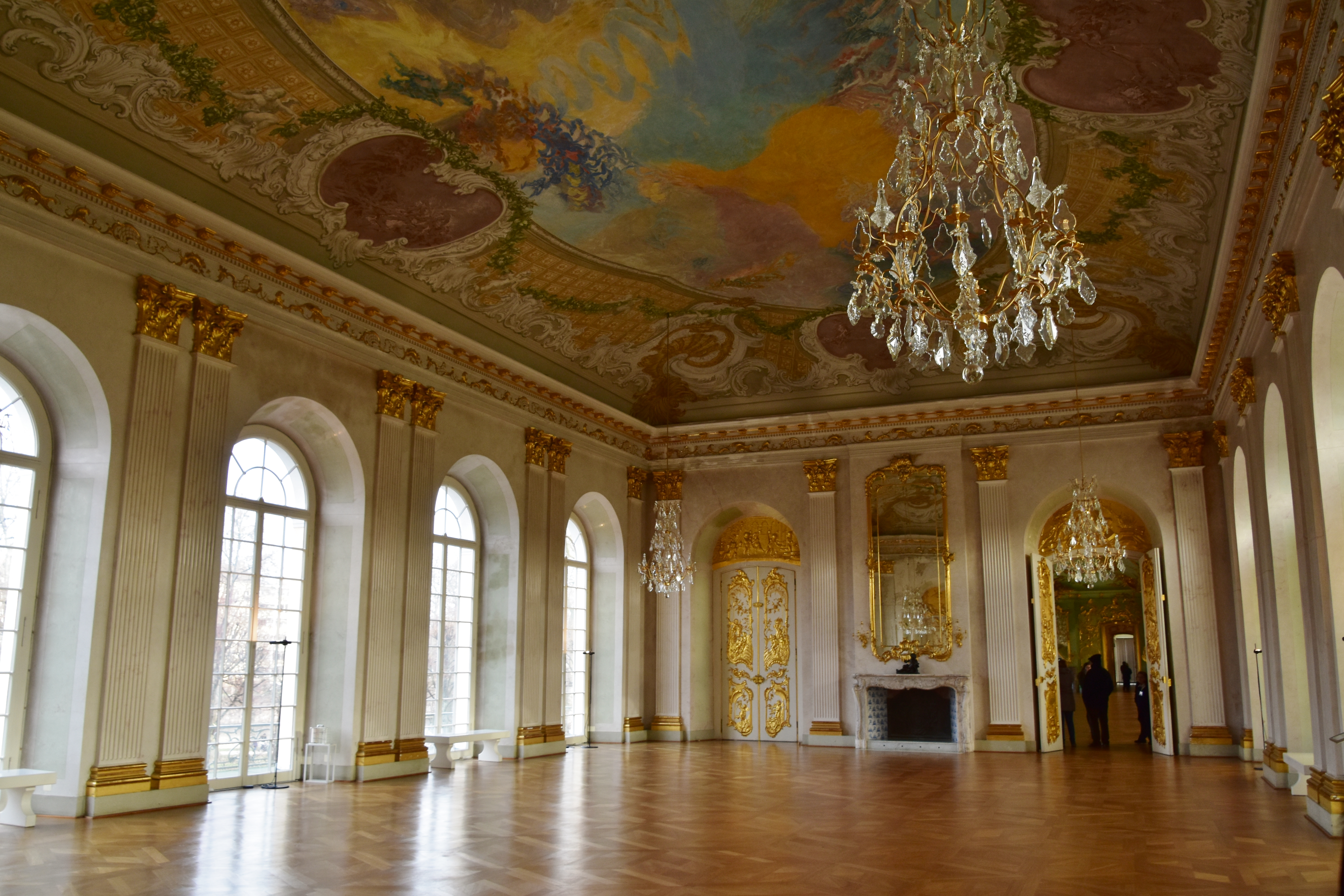 Charlottenburg Palace, 1695-1746, Berlin (70)